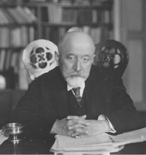 Władysław Leopold Jaworski